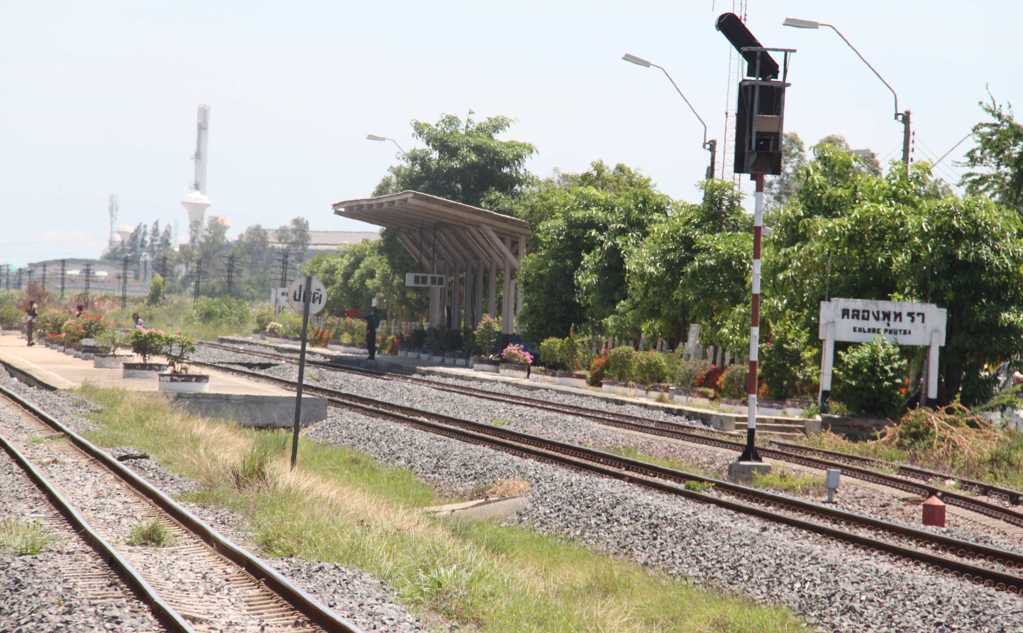 Khlong Phutsa railway station